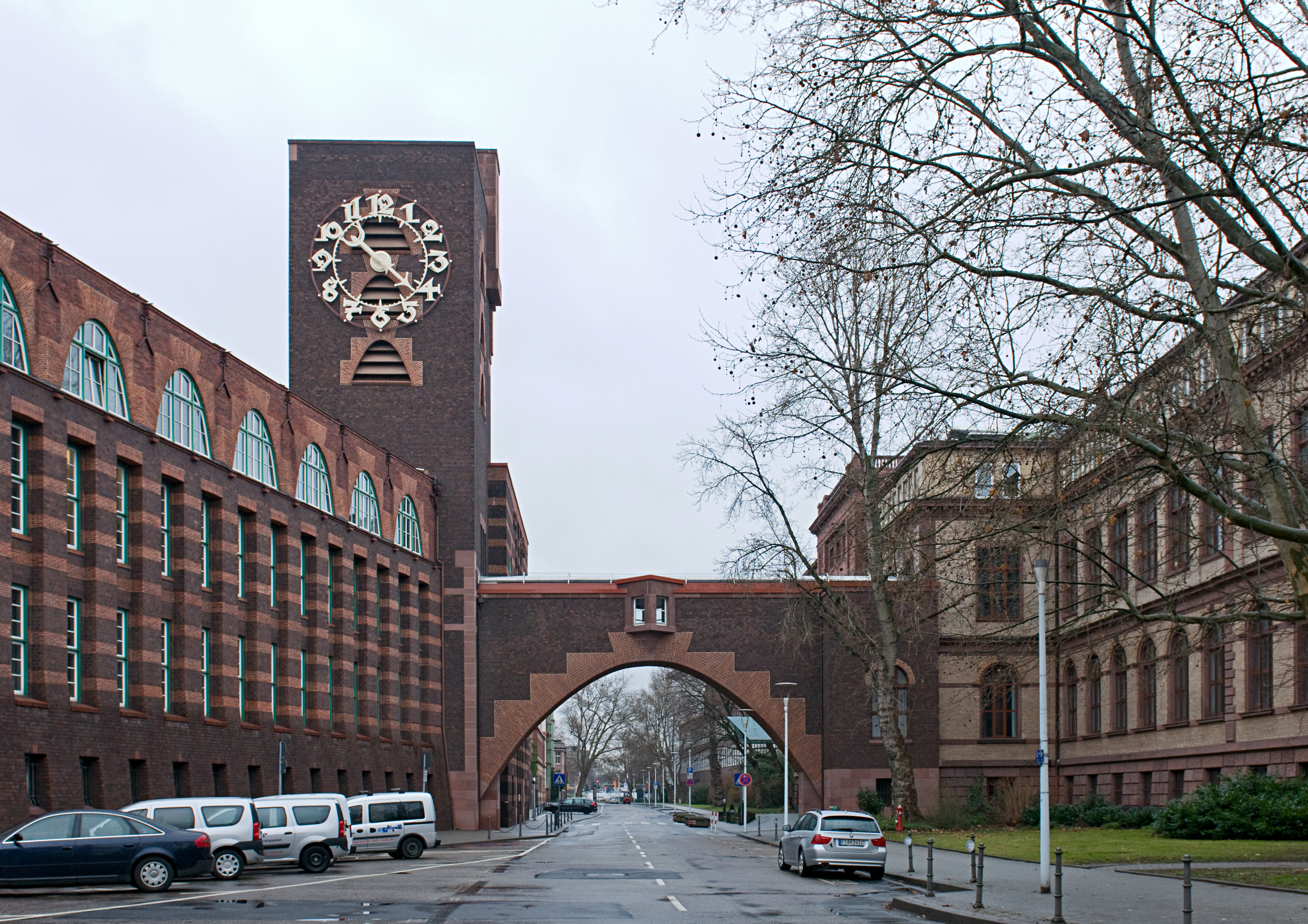 Industriepark Höchst Blick von Westen in die Brüningstraße auf den Behrensbau mit Brücke und Turm